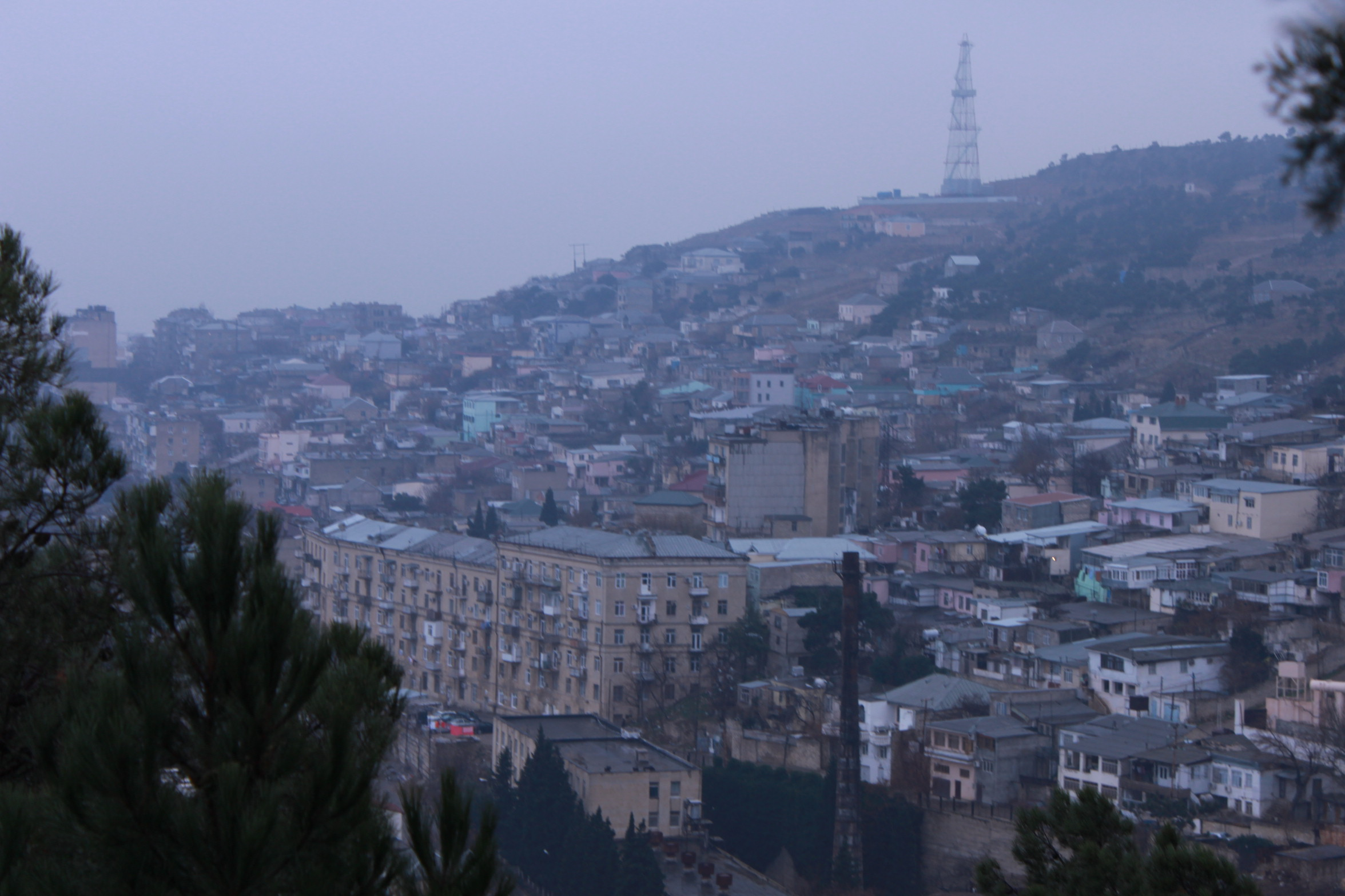 Балово. ул. Красина. ул. Гурбана Аббасова. Вечер. Вид с Шахидляр Хиябаны